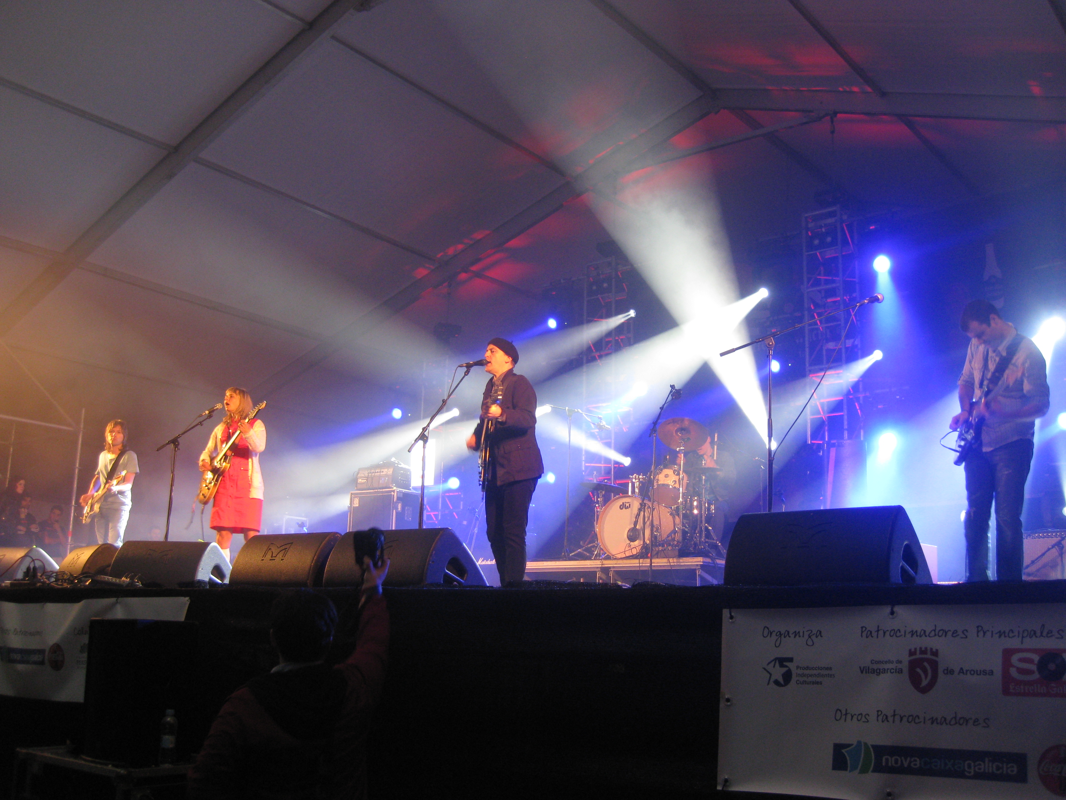 A banda The Vaselines no Festival do Norte 2011, en Vilagarcía de Arousa.